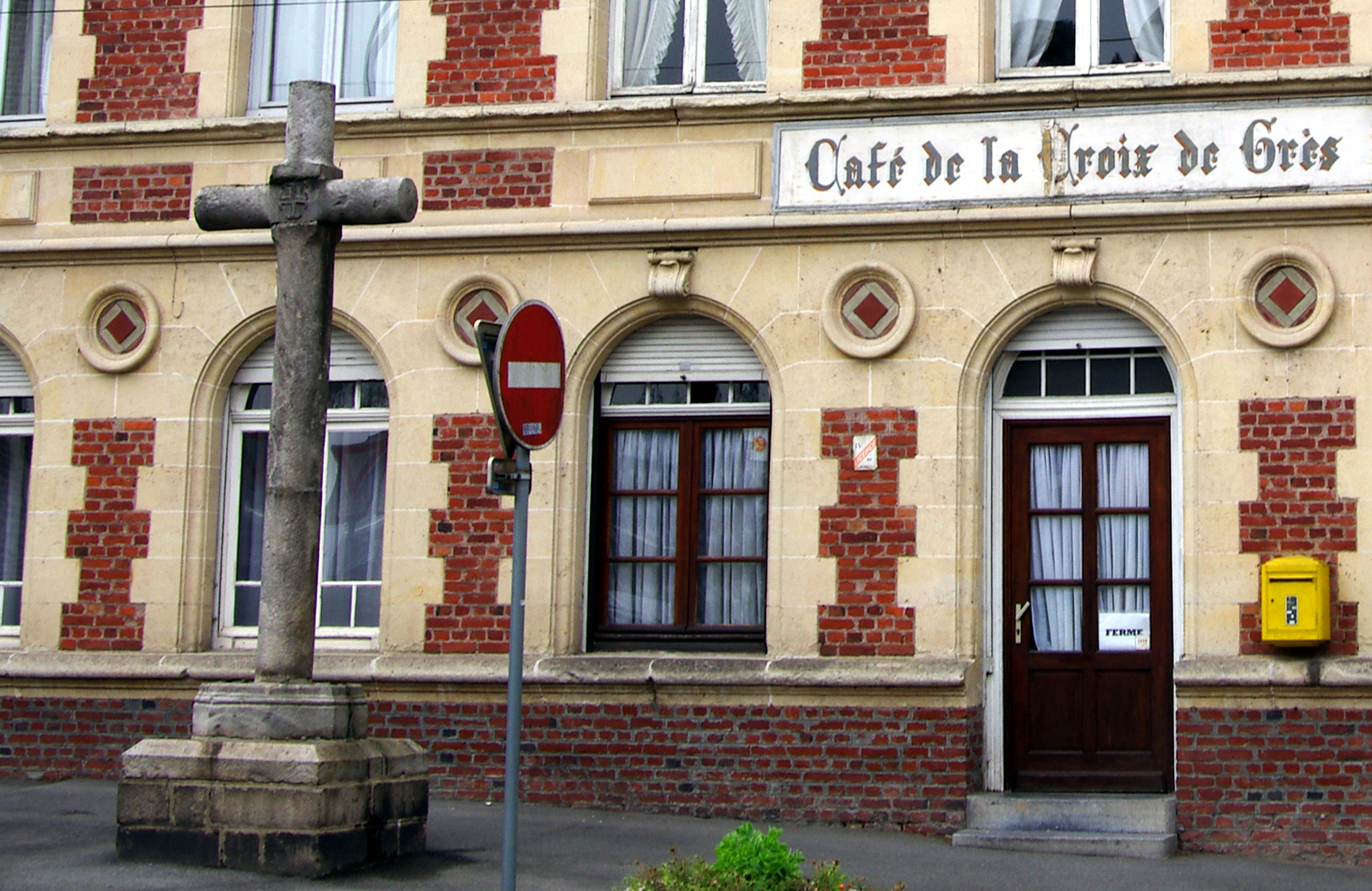 Sainte-Catherine-lès-Arras (Pas-de-Calais, France) - La croix de grès. .